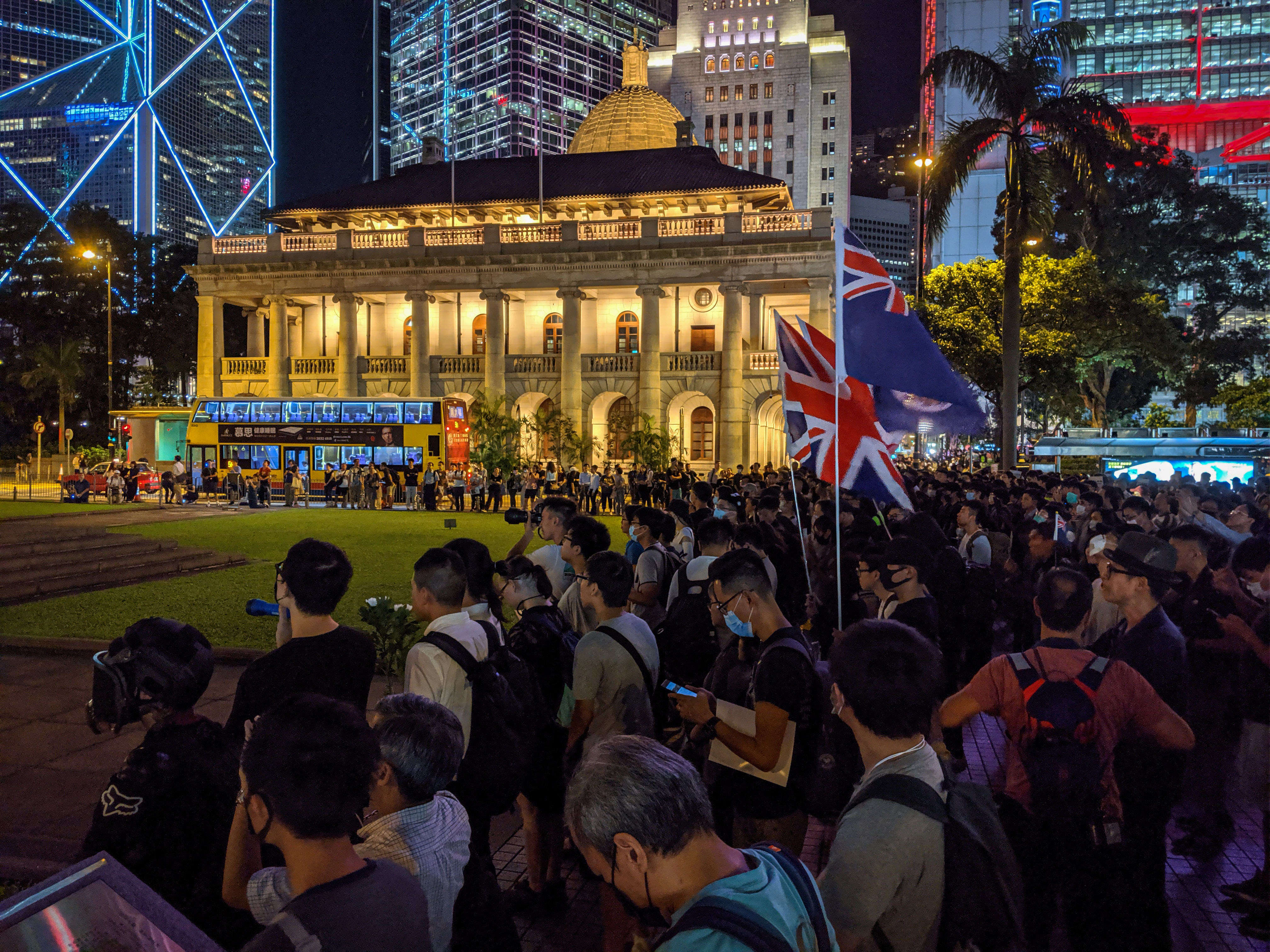 IMG_20190830_205041